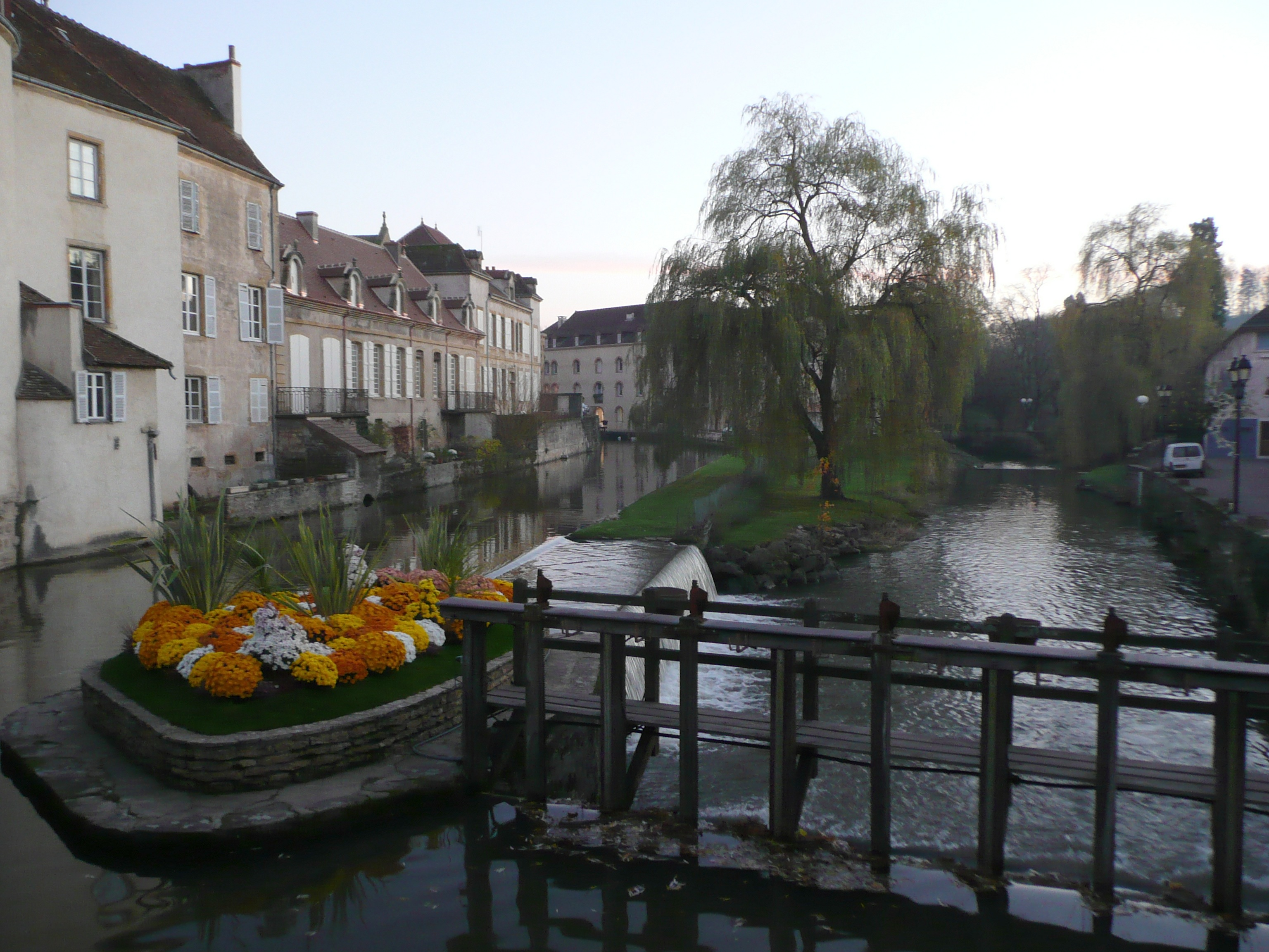 L'Arconce à Charolles (Saône-et-Loire, France)